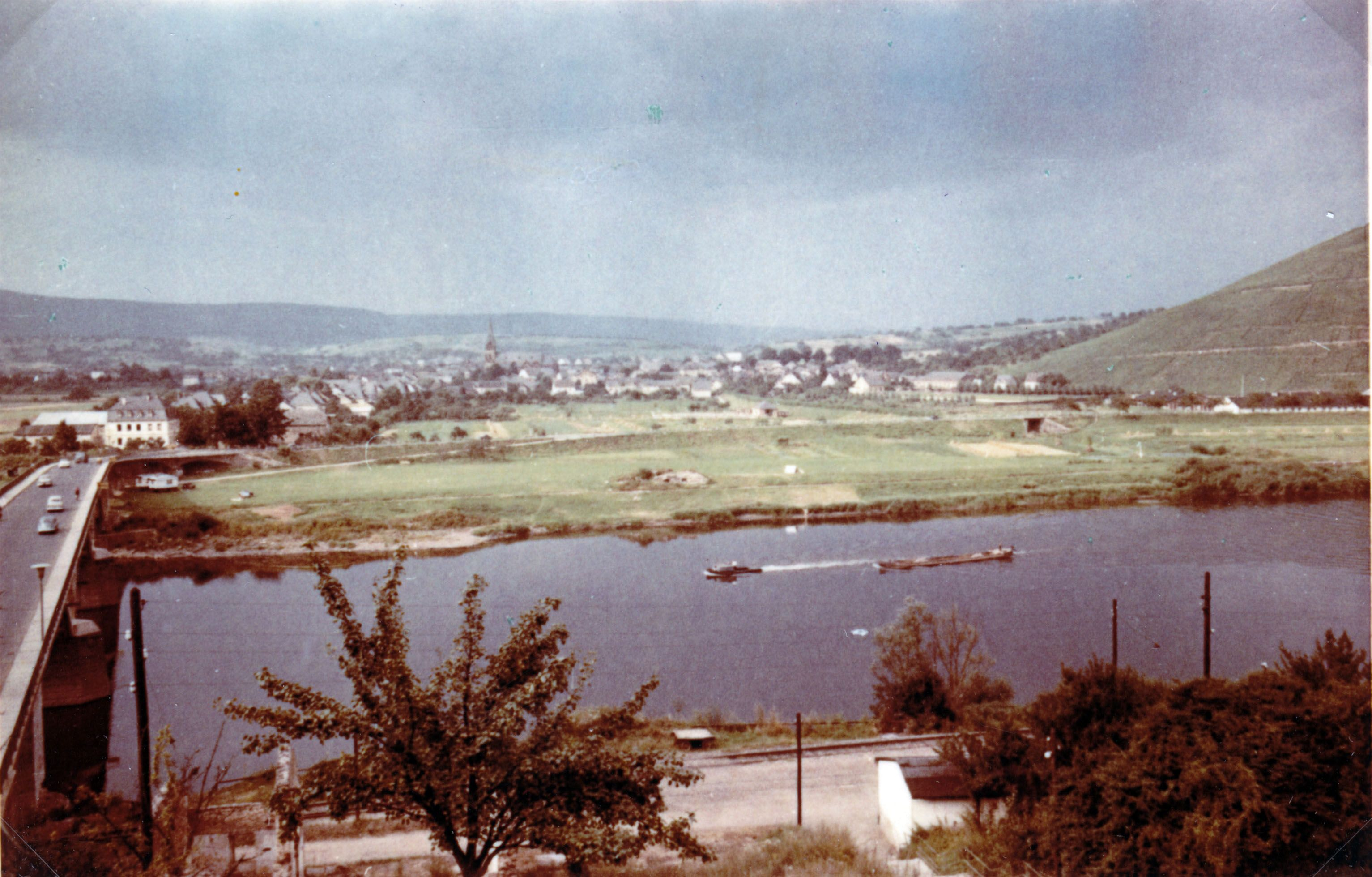 Mosel vor Ausbau bei Schweich. Blick auf Schweich (linkes Ufer) mit Brücke (L 141) und Deich.